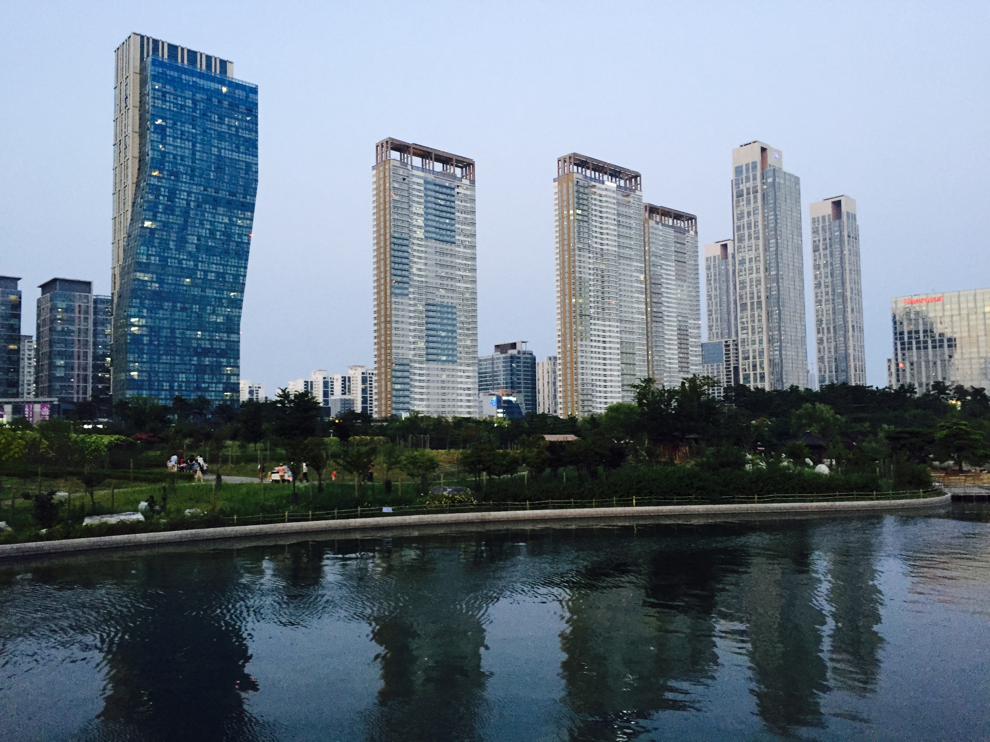 گروه پارسه سئول، پل ارتباطی مطمئن ایرانیان سراسر دنیا با کره جنوبی